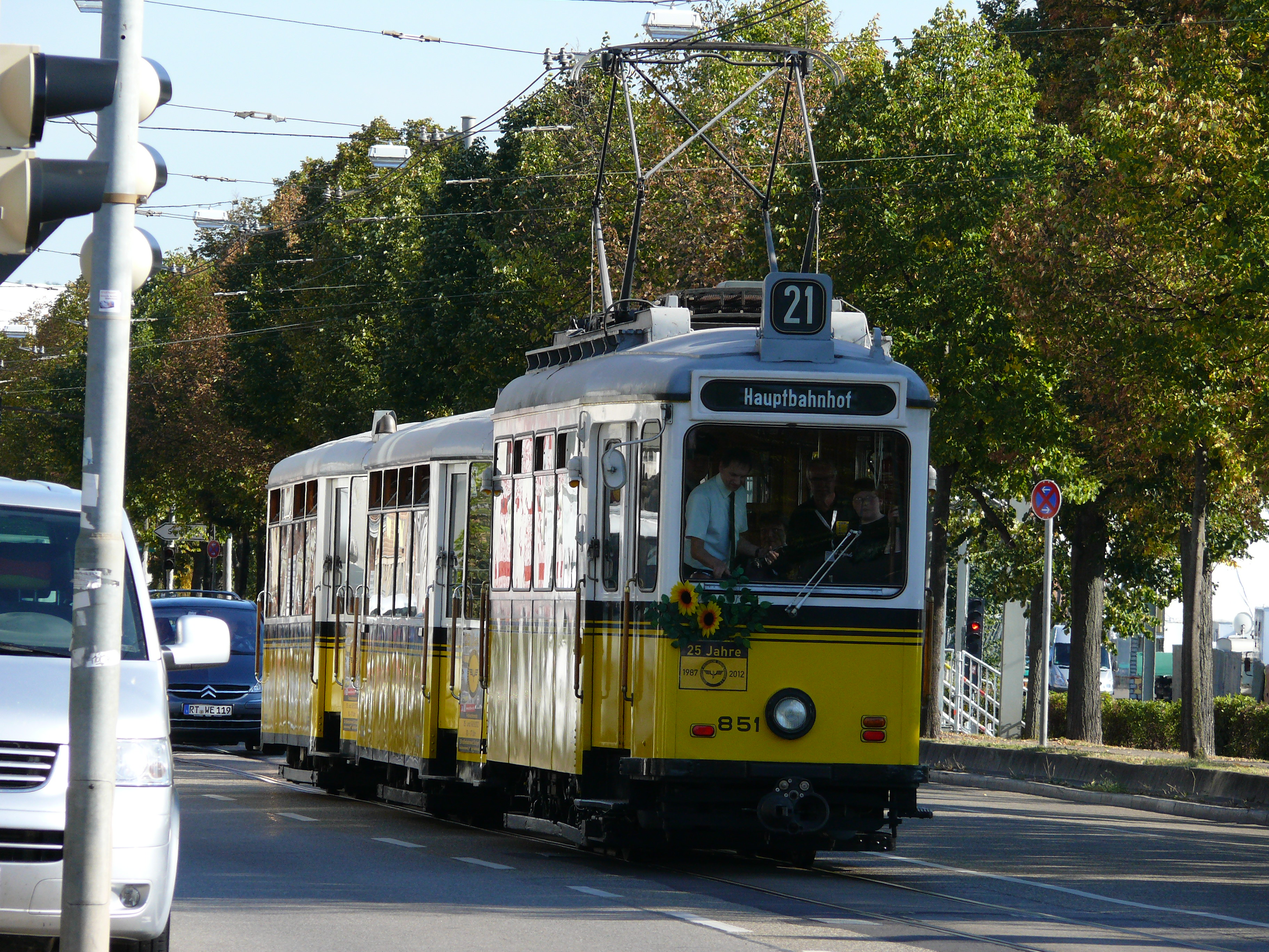 Triebwagen 851 + Beiwagen 1369 & 1390 als historische Linie 21, vor dem Straßenbahnmuseum in Stuttgart.